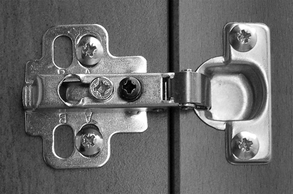 Topfscharnier